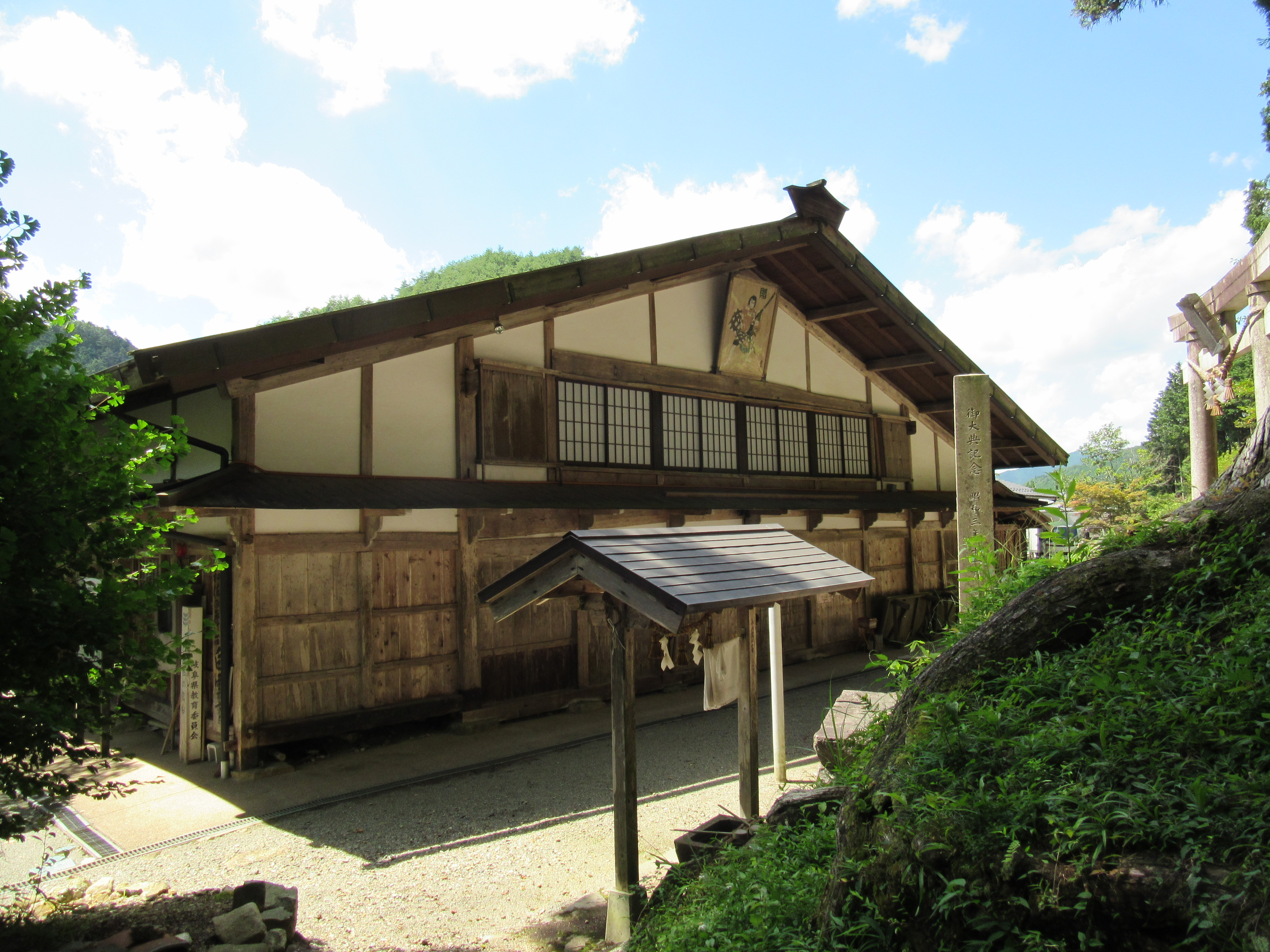 白雲座（下呂市門和佐）